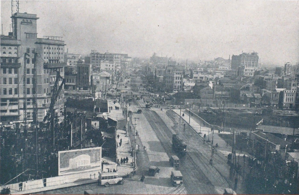 日比谷から数寄屋橋 左に朝日新聞社